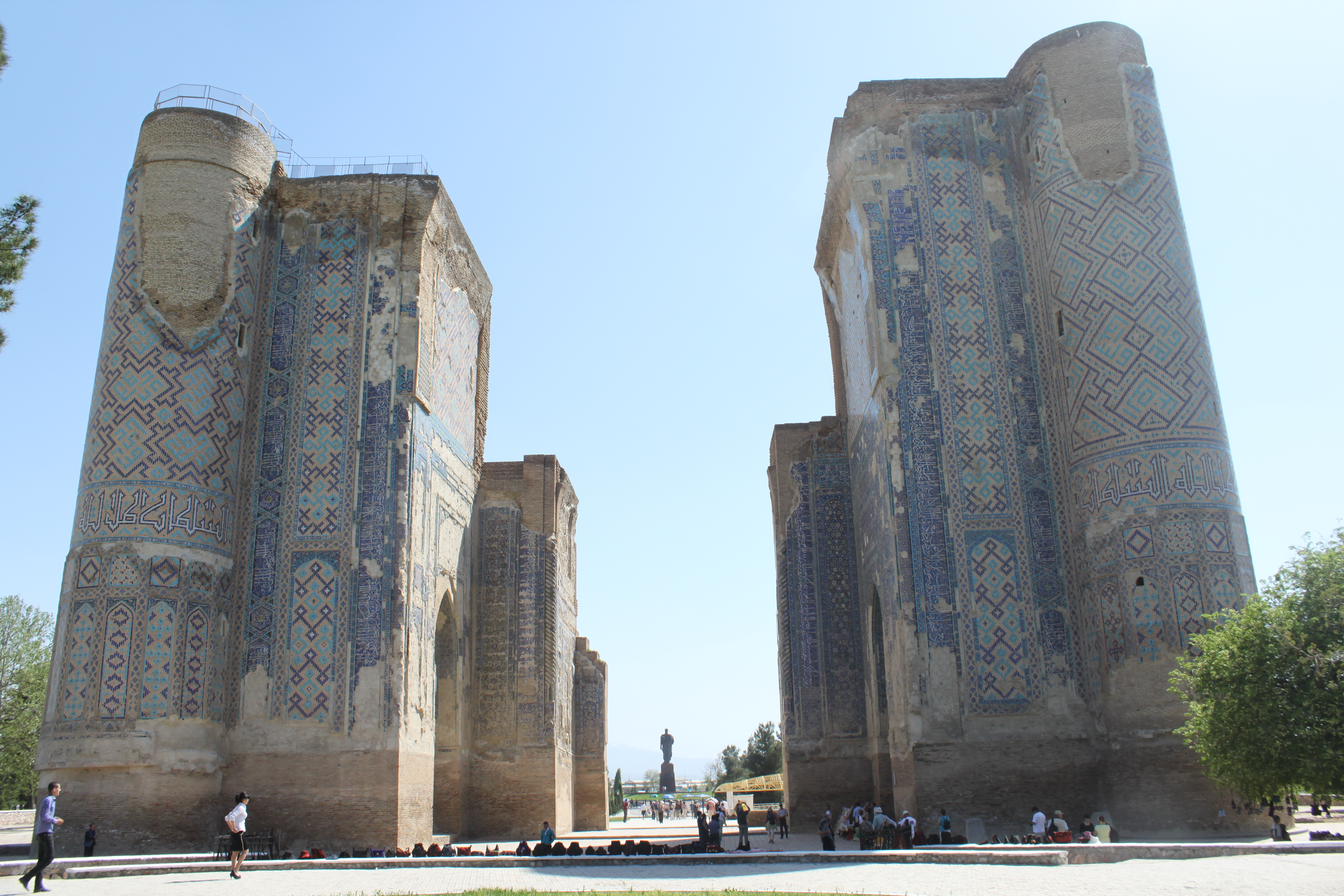 Ak Sarai à Shahrisabz